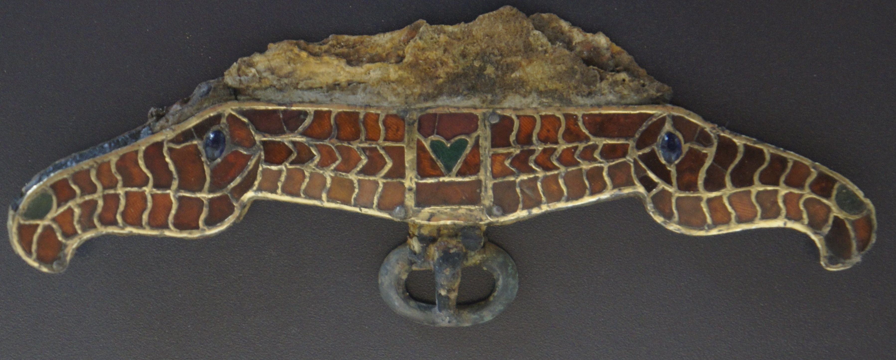 Fermoir_d'aumônière (grenats, or argent verre) trouvé dans une tombe 13 de st-Dizier.